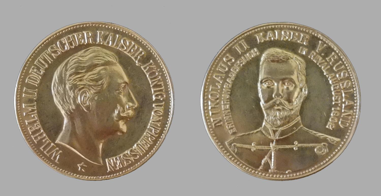 Золотая памятная медаль посвященная встрече Николая 2 и Вильгельма 2 Кайзера в Ревеле в 1902 г.